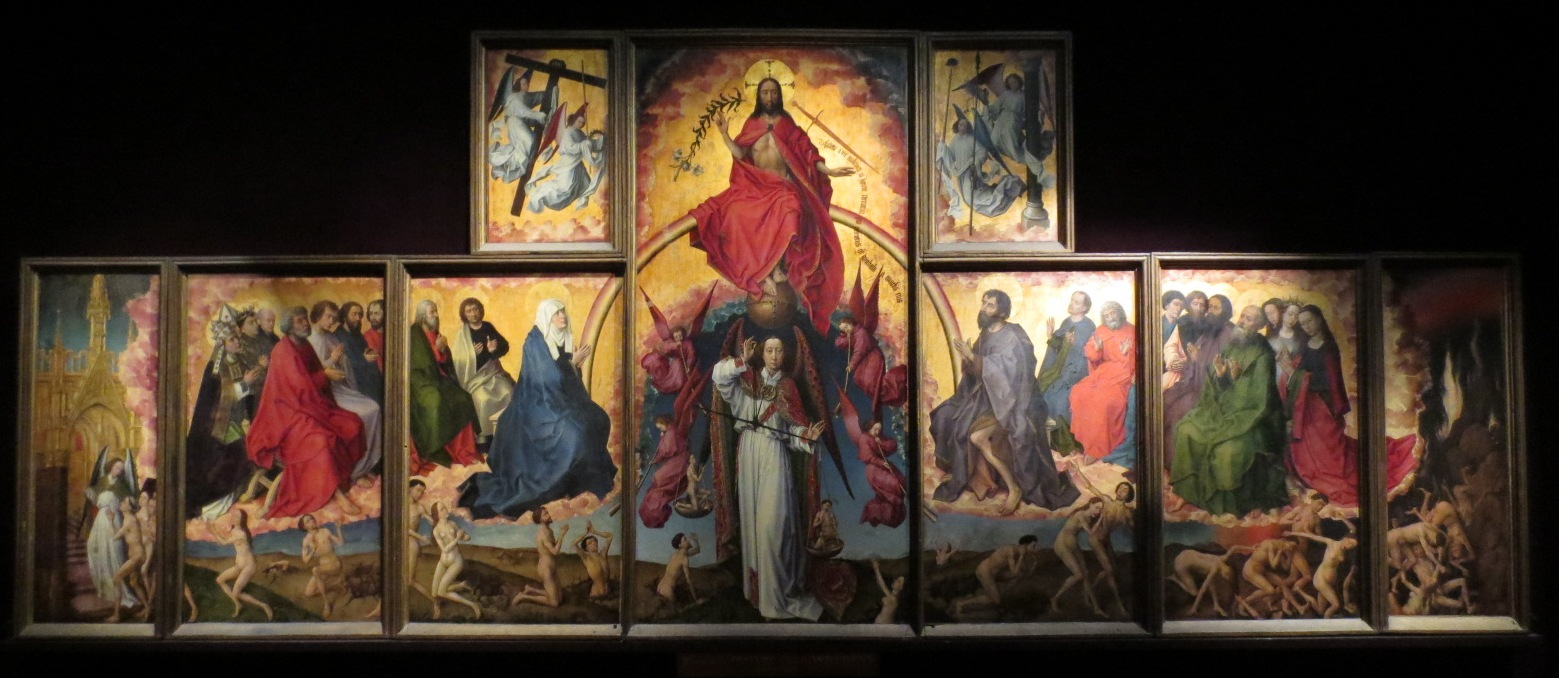 Polyptyque du Jugement dernier